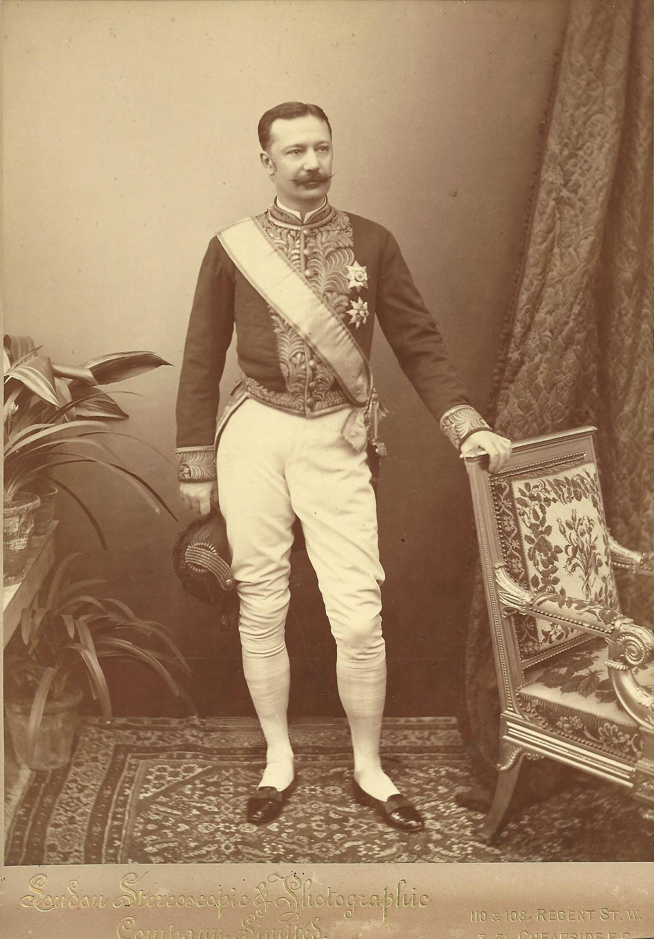 Comte John d'Oultremont, l'ami intime de SM Léopold II.